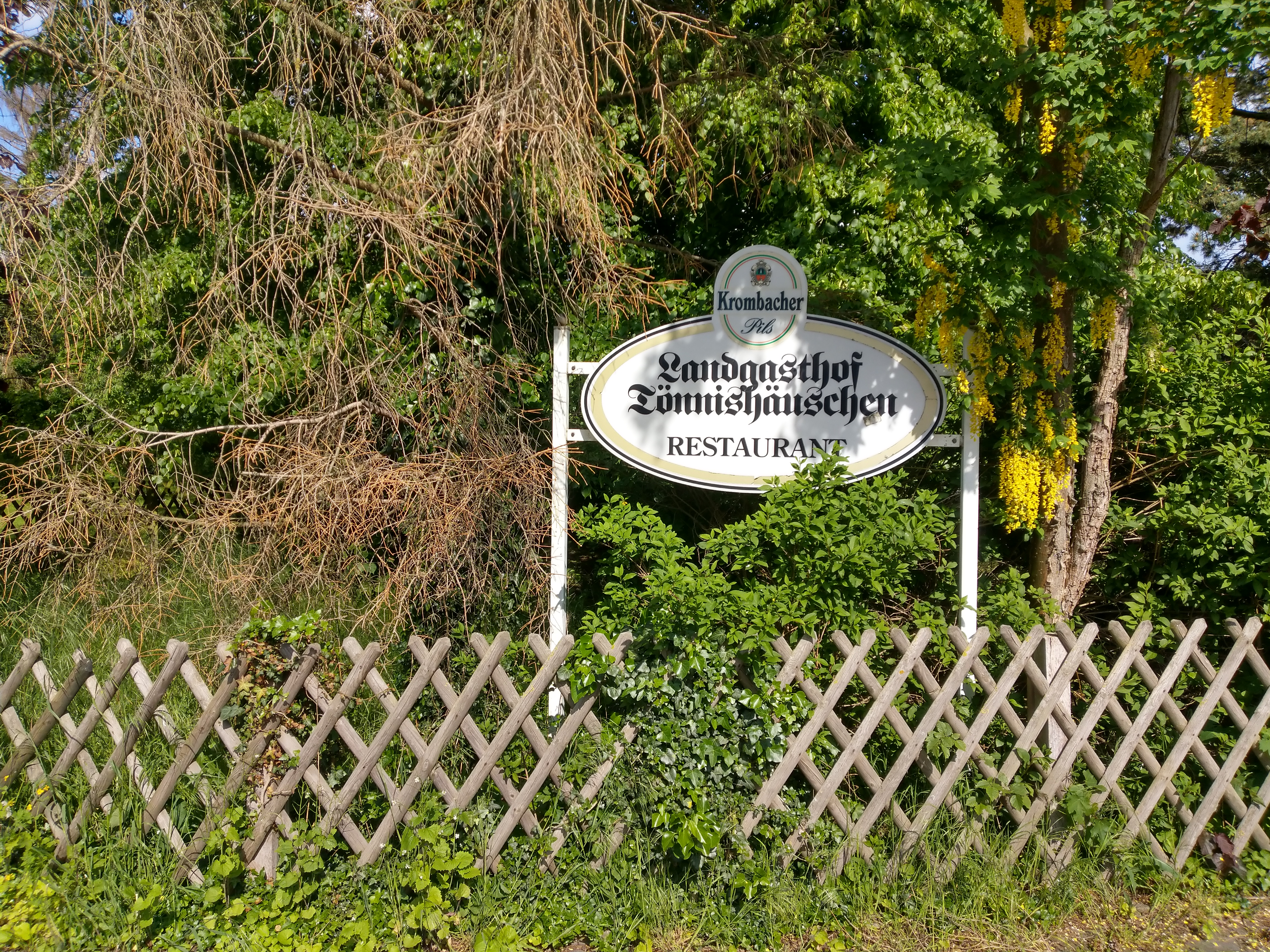 Ein Schild vom Landgasthof Tönnishäuschen